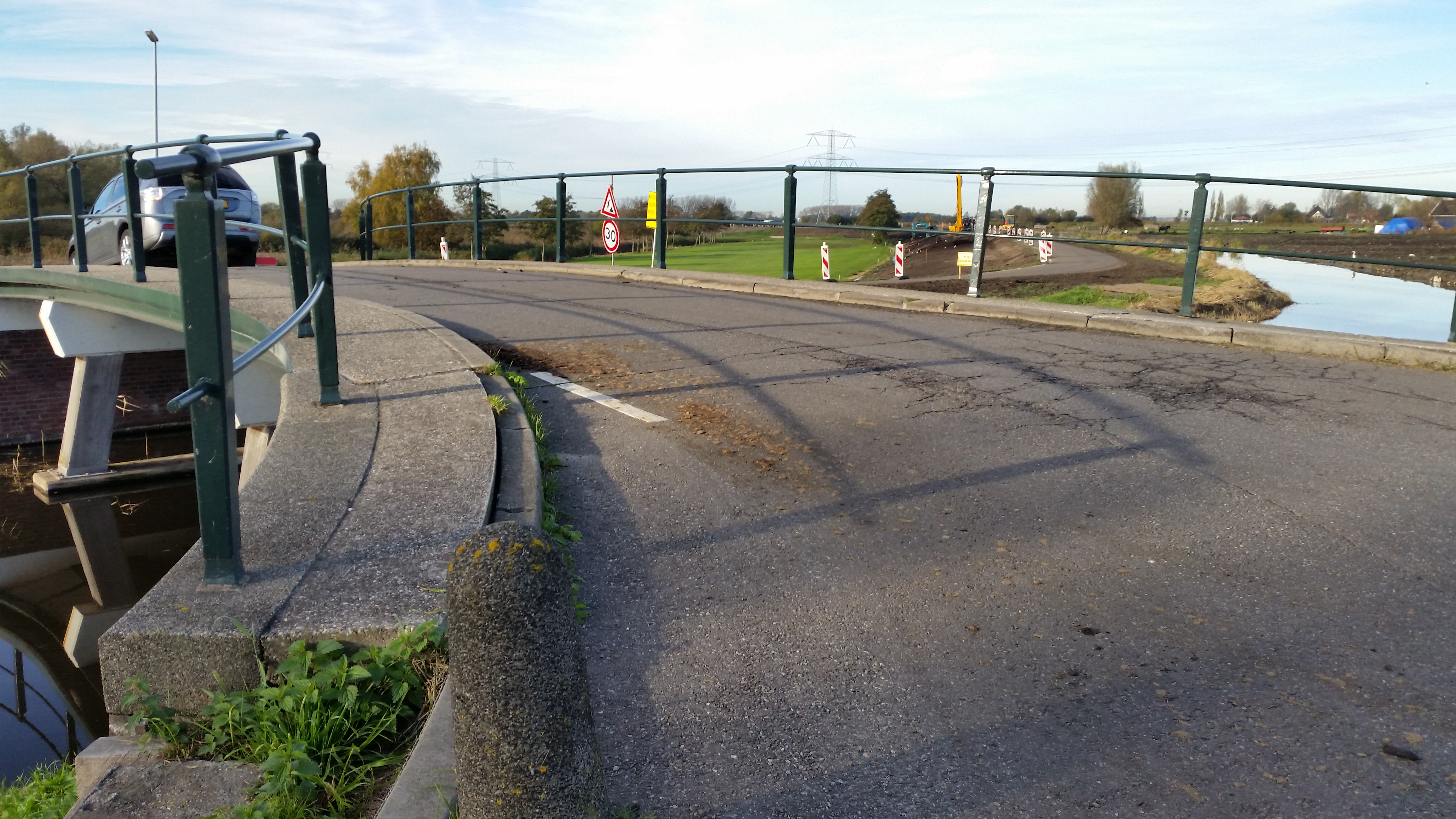 Brug 373 (in Amsterdam), overzicht naar Buikslotermeerdijk